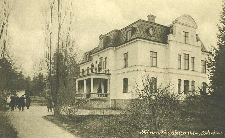 Pålsons konvalescenthem Södertörn